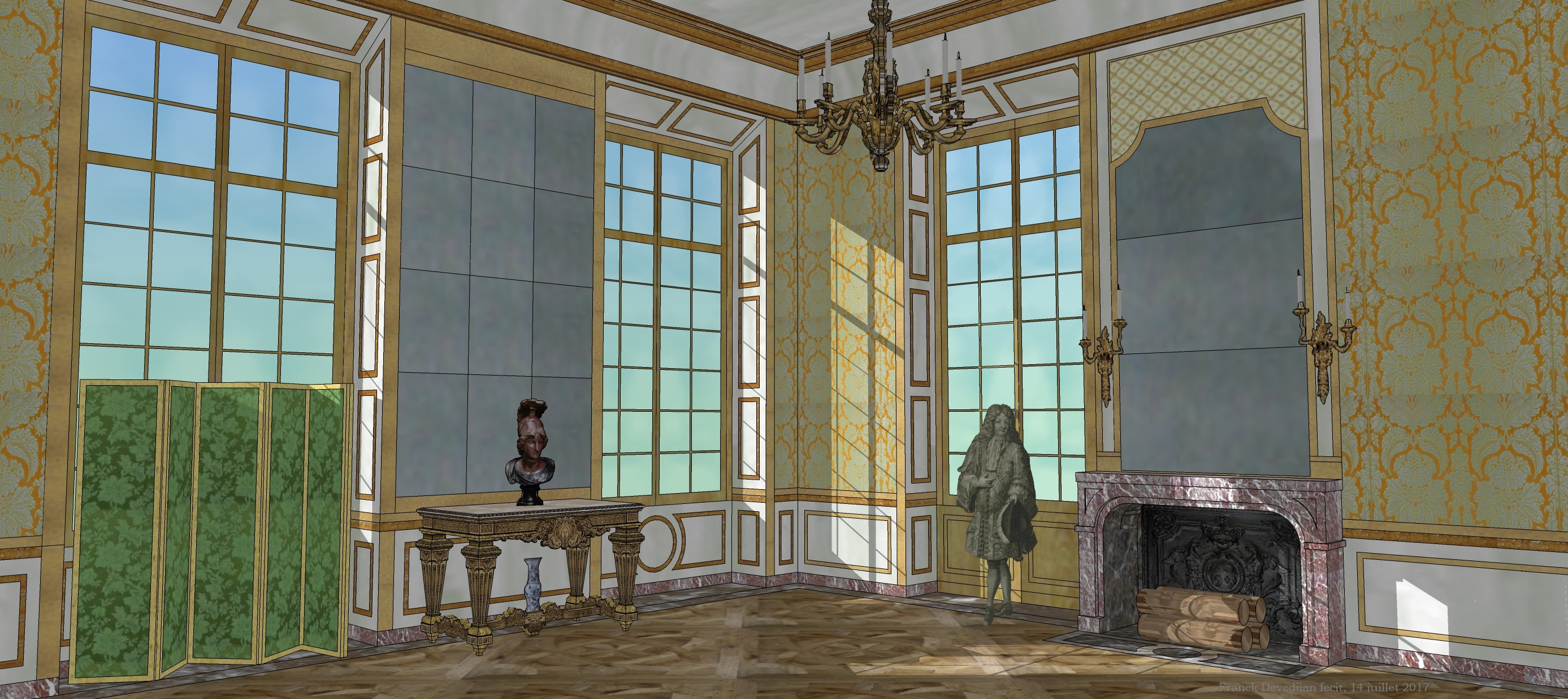 Essai de restitution du Salon du Petit Pont, premier étage du château-vieux de Meudon. Vers 1700.